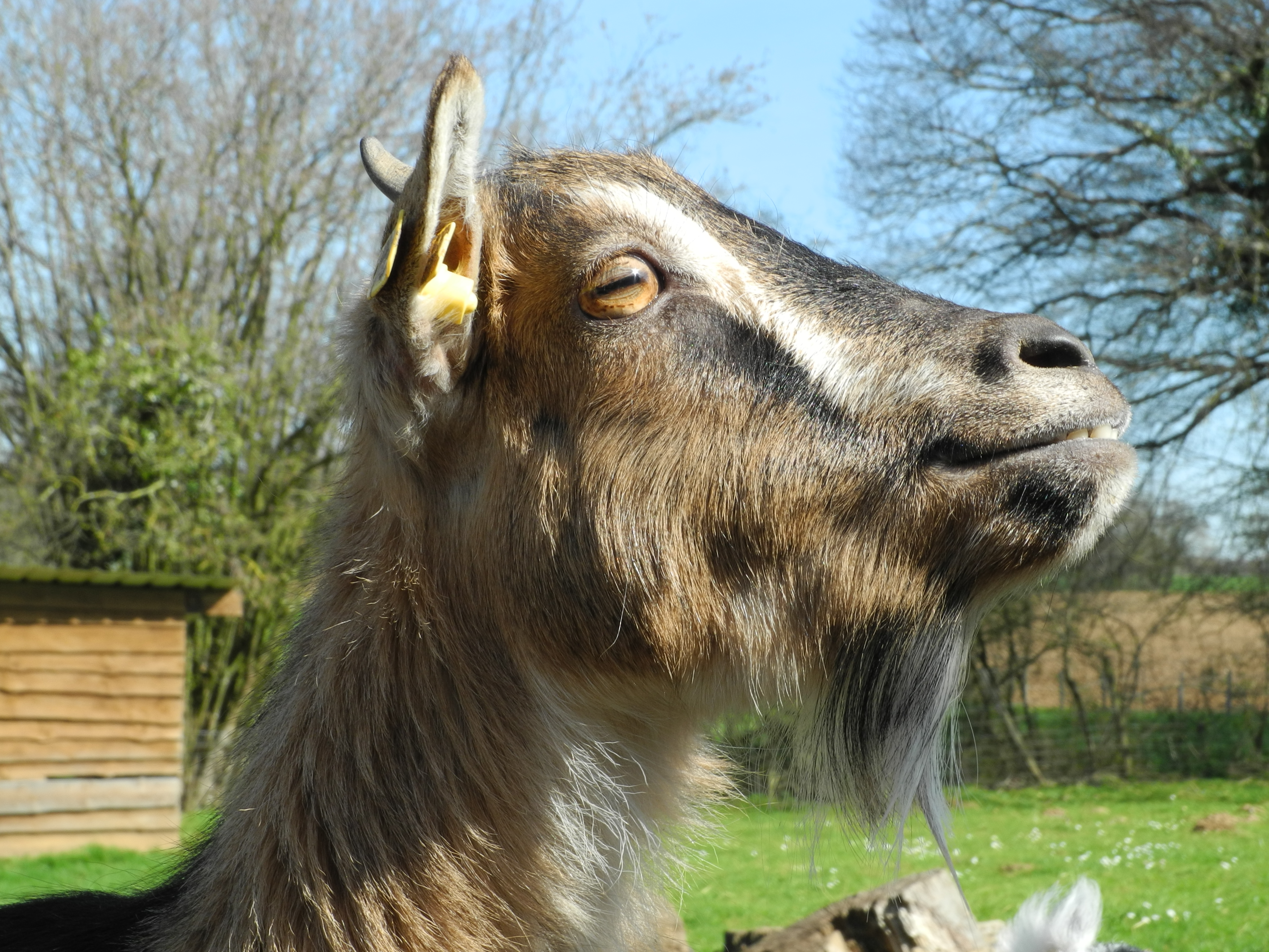 Chèvre